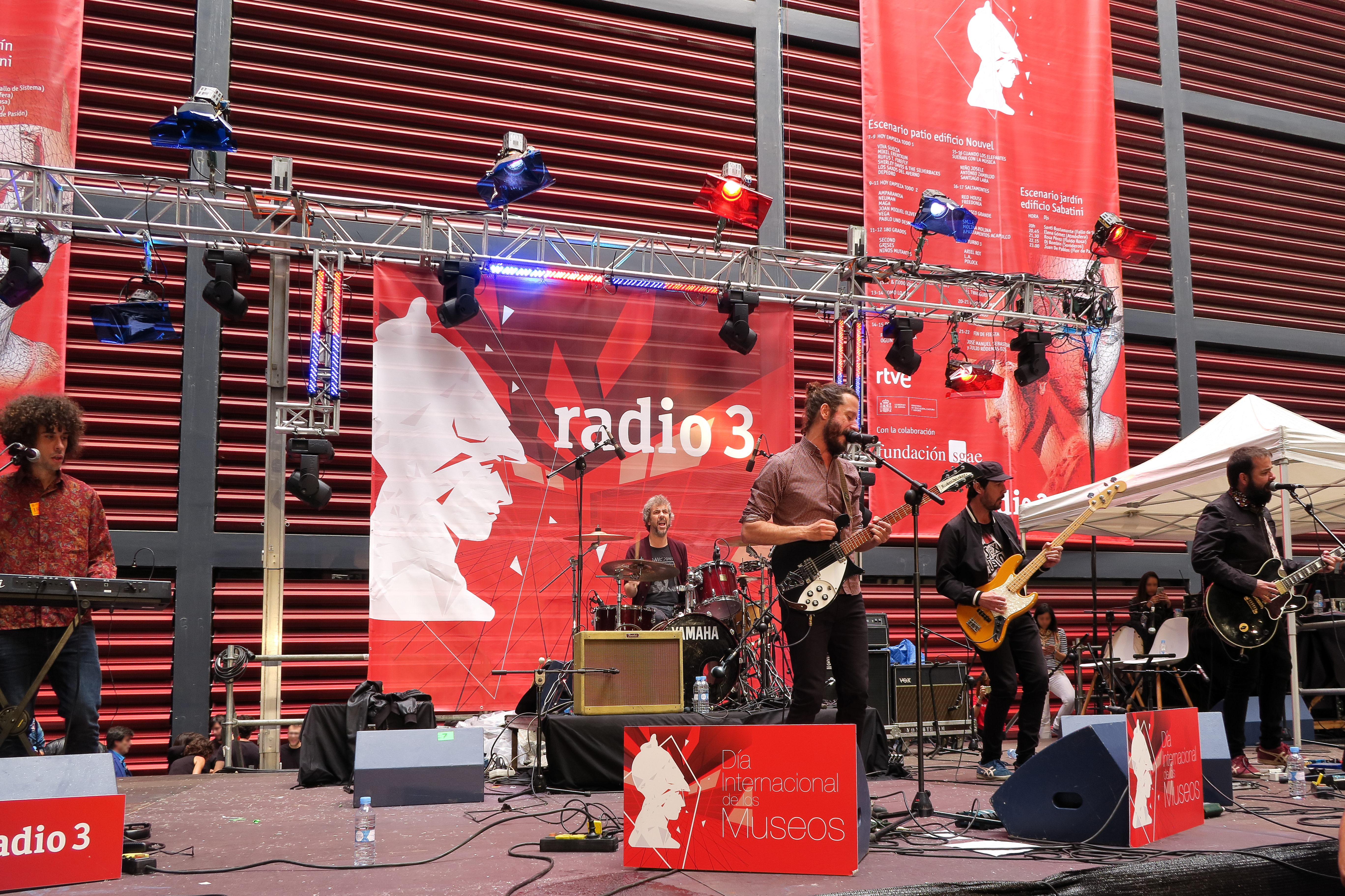 Niños Mutantes, 03, en el patio del Museo Nacional Centro de Arte Reina Sofía, Día de los Museos y Radio 3